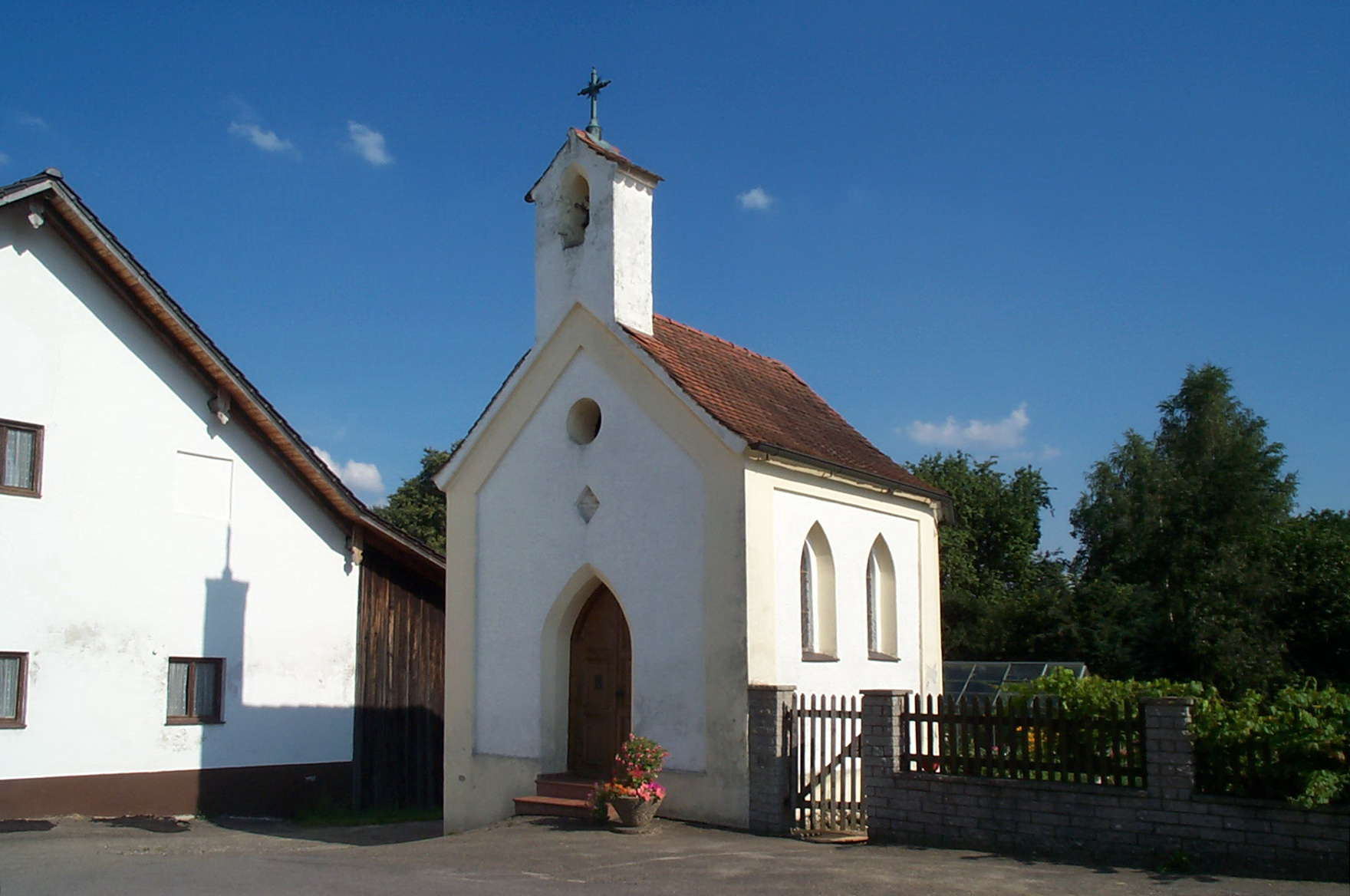 Hofkapelle Maria unbefleckte Empfängnis in Penk